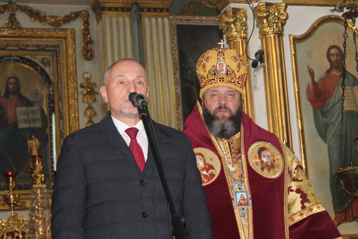 Митрополит Михаїл (Зінкевич) та Голова Волинської облдержадміністрації Олександр Савченко під час заходів з нагоди Дня захисника України